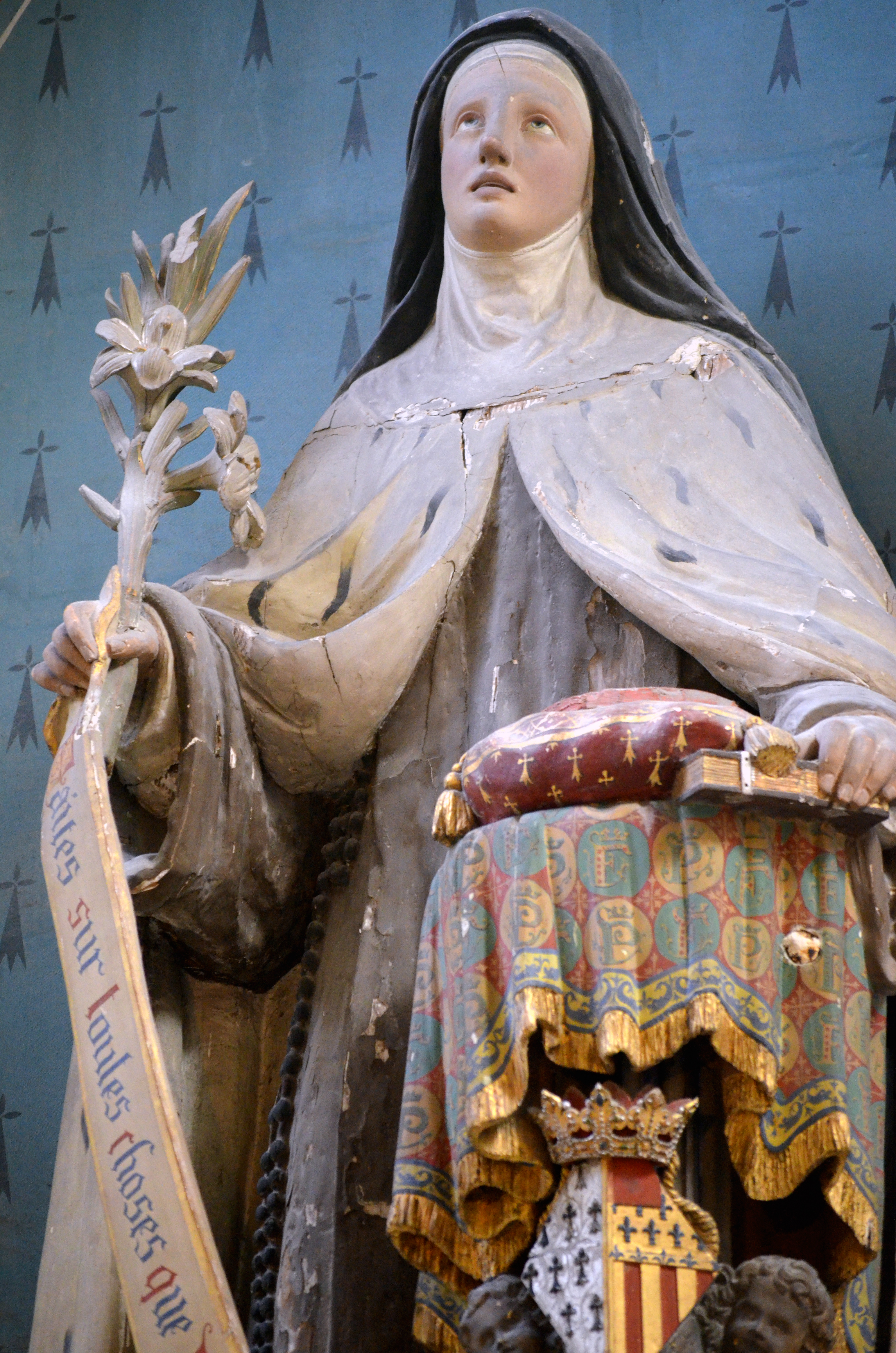 Statue de Françoise d'Amboise présente dans la Cathédrale Saint-Pierre-et-Saint-Paul - Nantes (Loire-Atlantique)